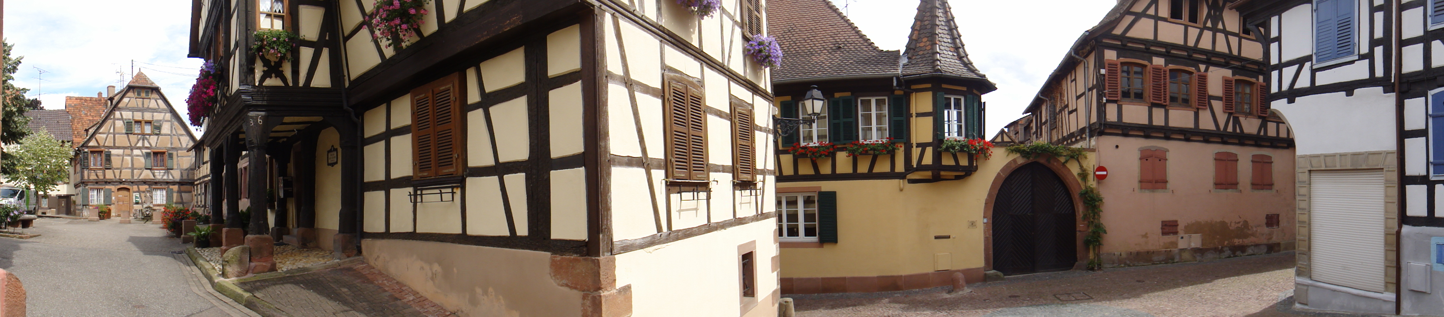 Alsace, Bas-Rhin, Bouxwiller, Maison (1661), 23 place du Marché-aux-Grains (IA67009658). Maison de receveur, dite Kaufhaus et Waaghaus (1636), 26 place du Marché-aux-Grains (PA00084654, IA67009661). Hôtel des Gayling (1604), 3-5 rue des Seigneurs (IA67009678).